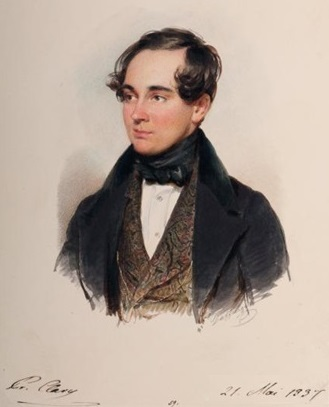 Moritz Daffinger